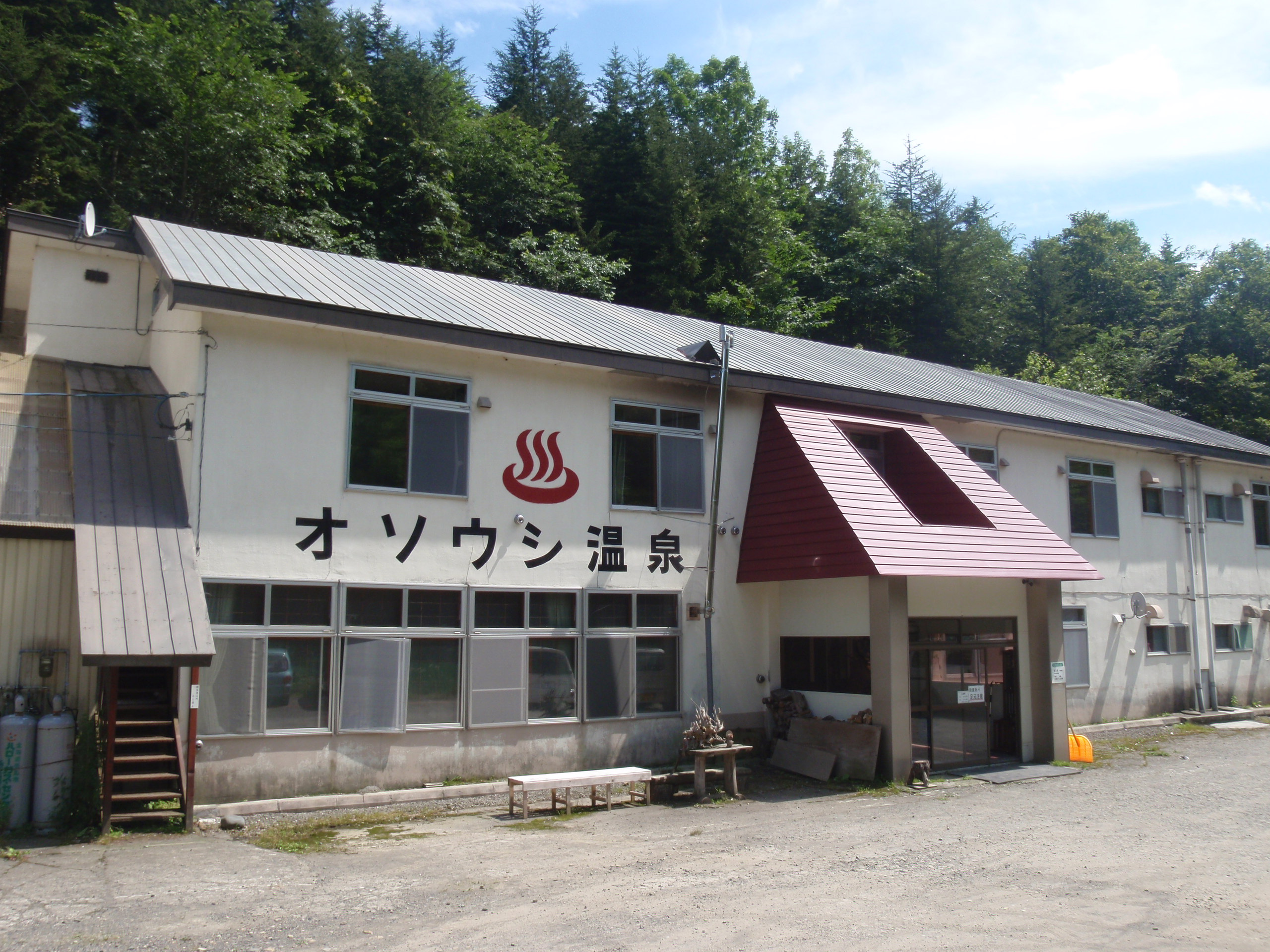 オソウシ温泉鹿乃湯荘